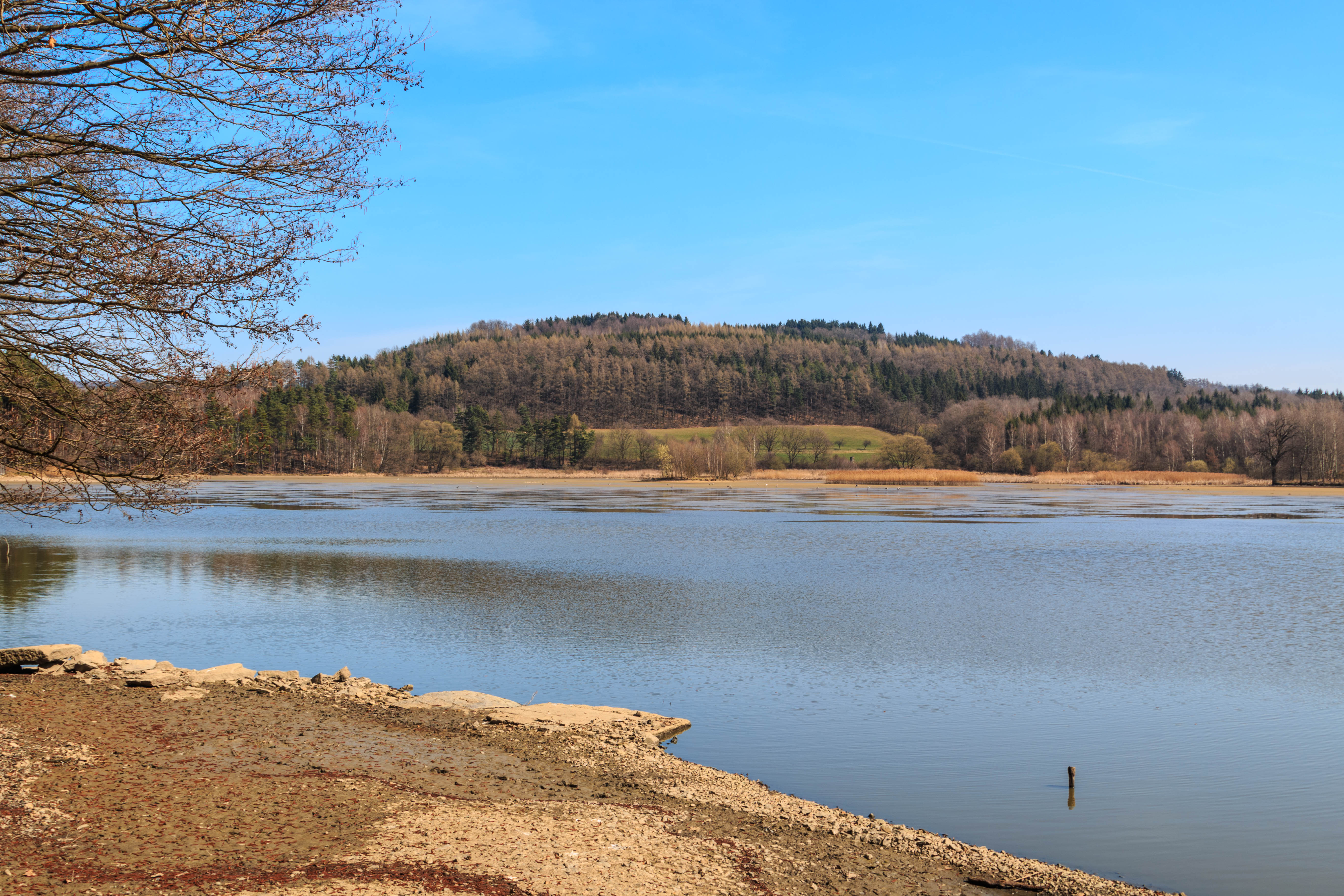 Rybník Stavenov Project: Vodstvo.